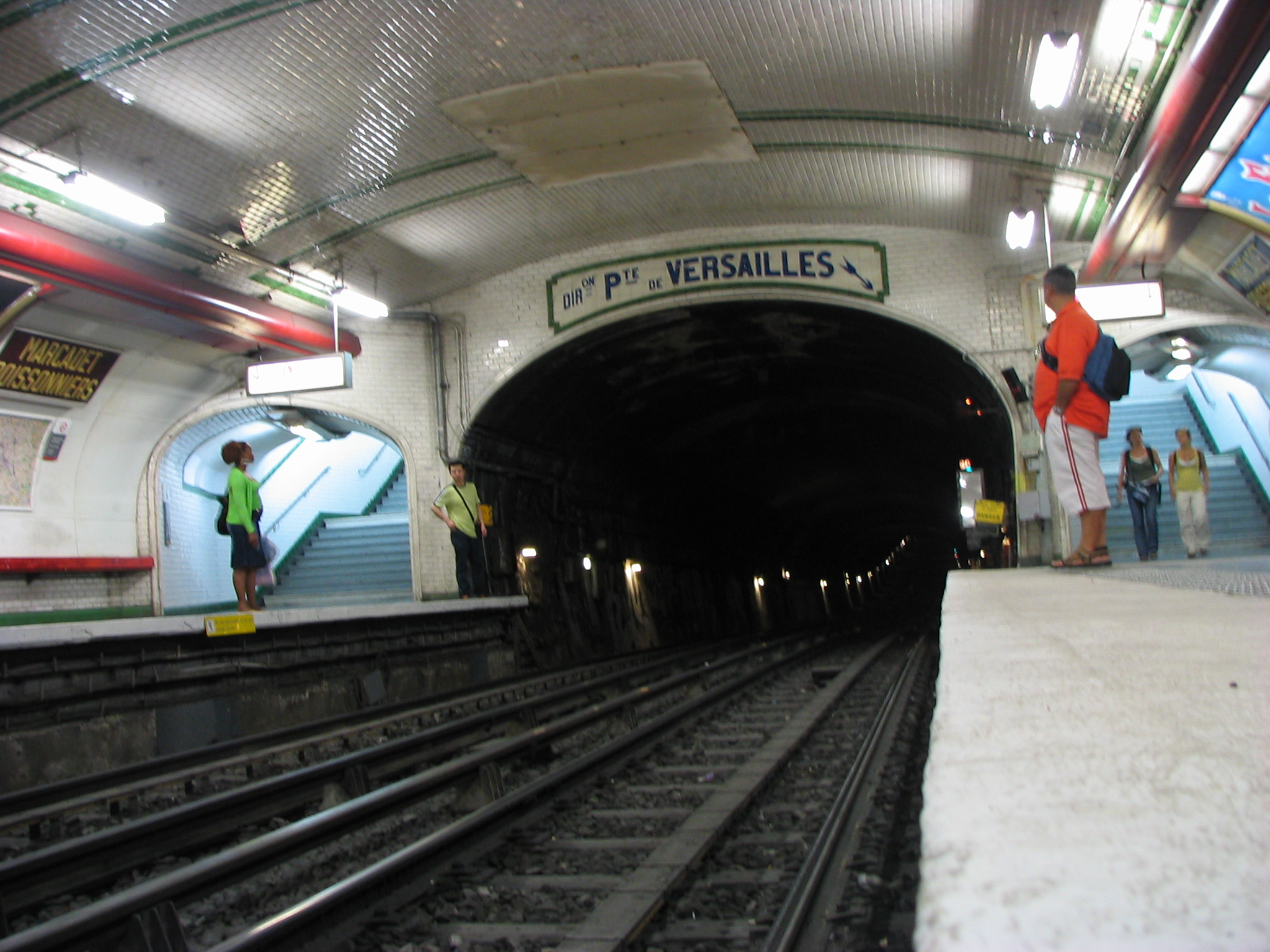 Todos miraron al túnel cuando me puse a hacer la foto. Después me miraron a mi con cara de lástima, creo...